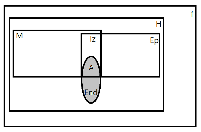 Relacje morfizmów